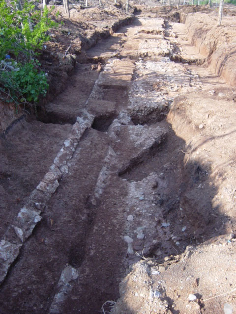 Restes del Rec Comtal al seu pas per Sant Andreu, al carrer Coronel Monasterior, 2004